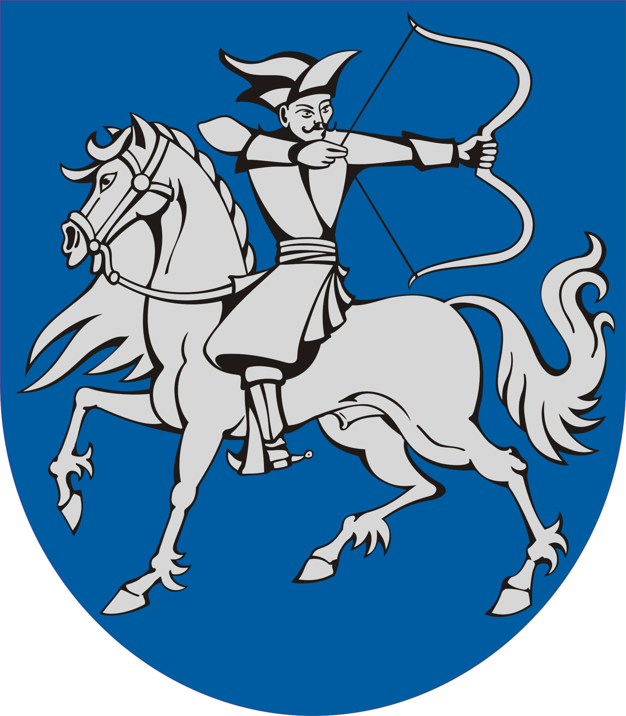 Coat of arms of Harkakötöny, Hungary